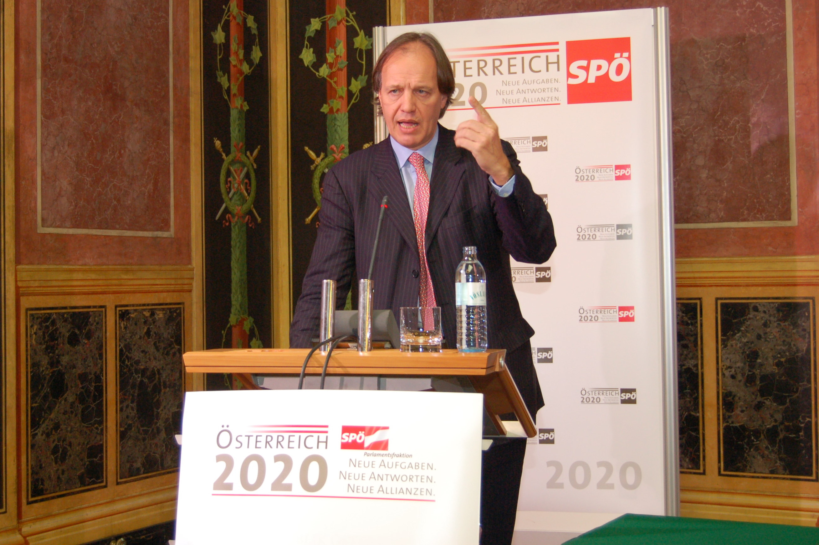 Diskussionsveranstaltung "Der Sozialstaat im 21. Jh. - Vision oder Utopie?" vom 18.3.2010 Copyright SPÖ Klub